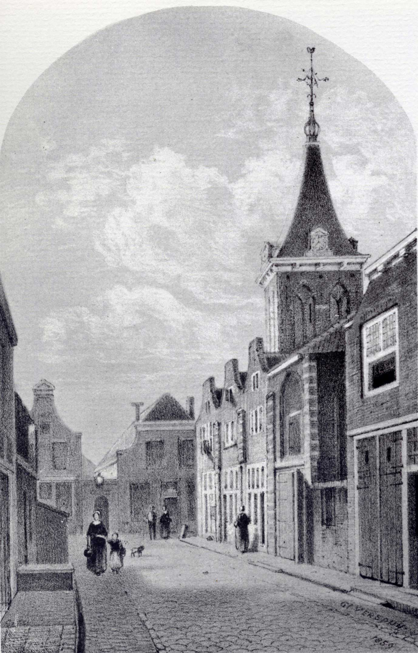 Sint-Barbaratoren in Gouda - lithografie